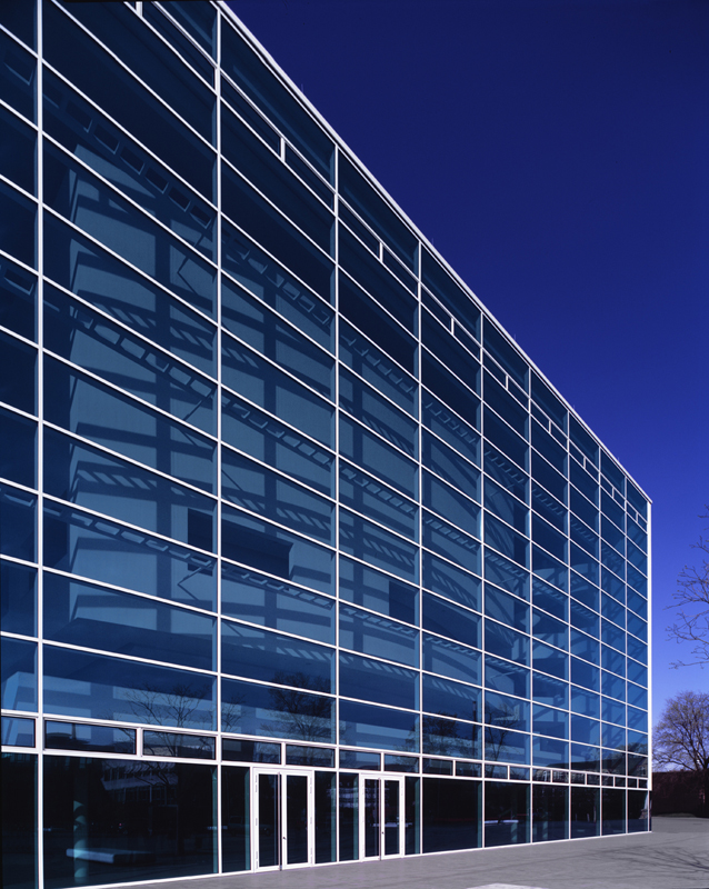 Theater Gütersloh. Verglaste Südfront bei Tag